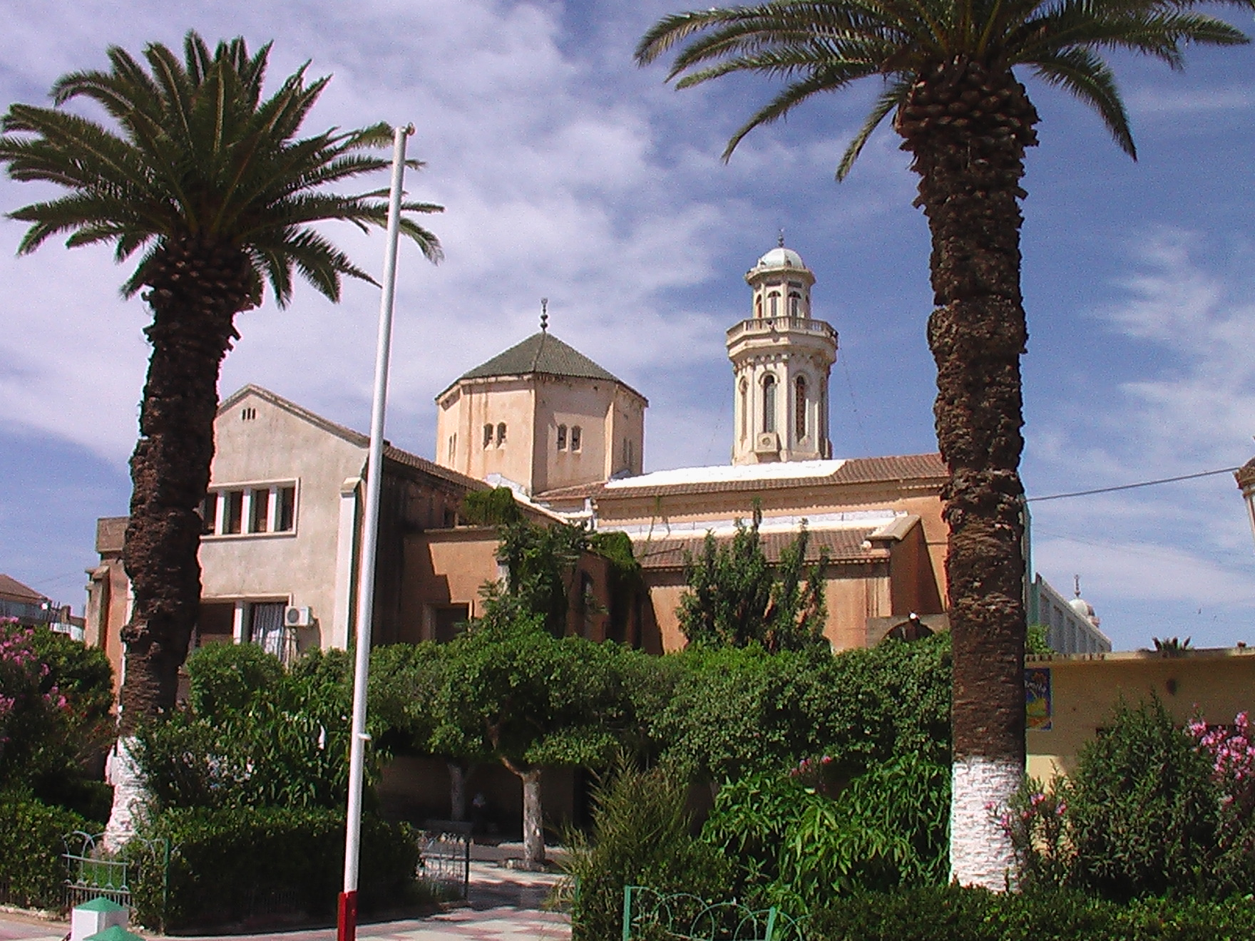 Mosquée En-Nour